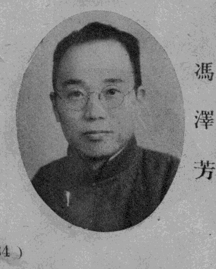 《民國名人圖鑑》肖像